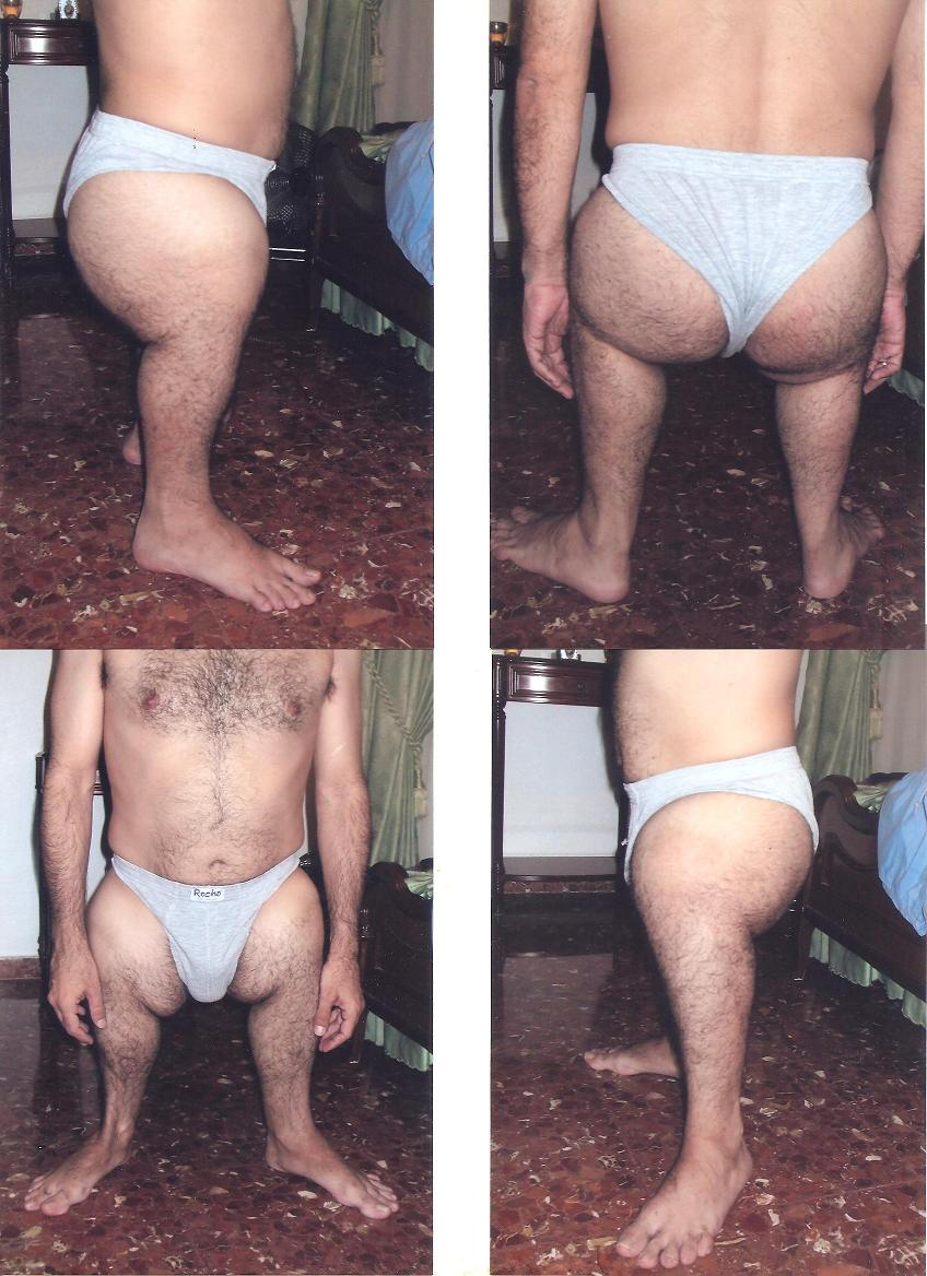 para que todo el mundo vea si esto no es herencia de la talidomida. un saludo.